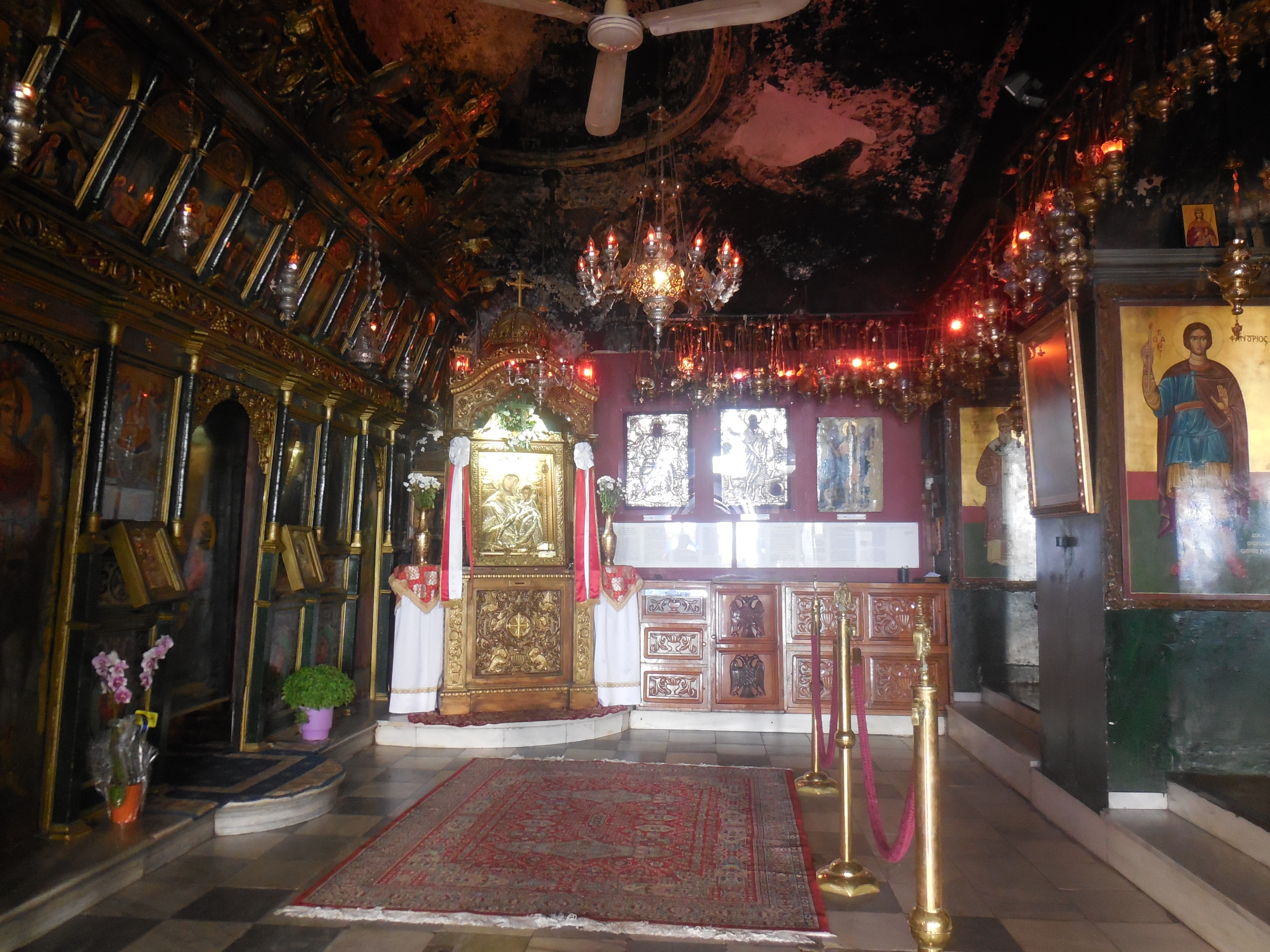 Внутри храма Богородицы Трипити, Эйон, Греция